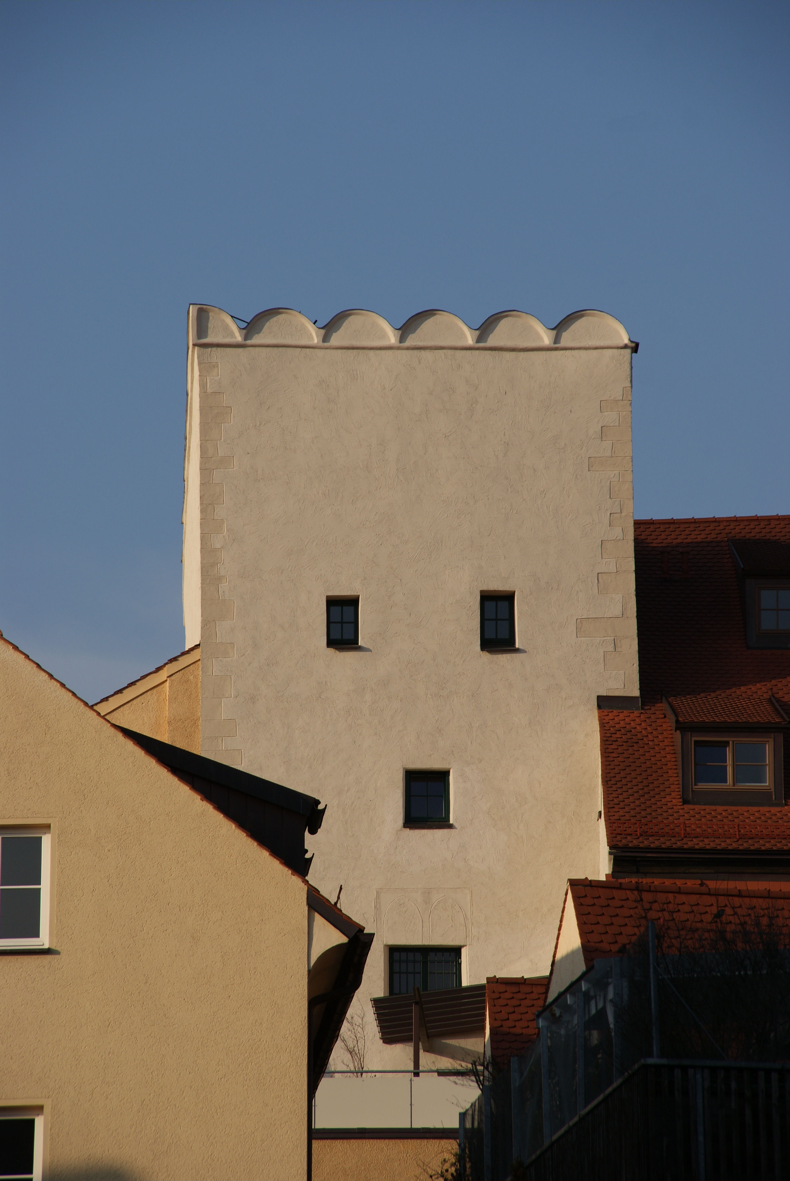 Zanthaus, westlicher Hausturm, Ansicht von SüdenThis is a photograph of an architectural monument.